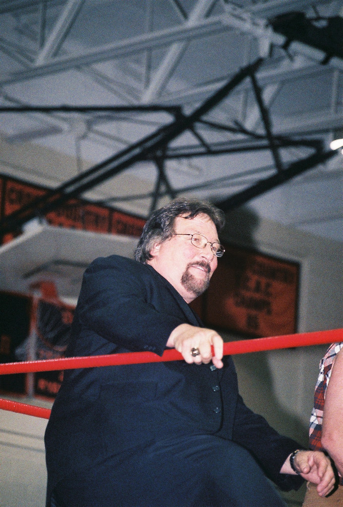 from Franklin, PA 4-10-10